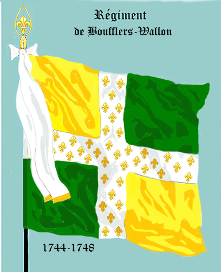 Ordonnanzfahne eines französischen Infanterie-Regiments (Wallonisches Fremdenregiment). - Entnommen und überarbeitet aus: „LES UNIFORMES ET LES DRAPEAUX DE L'ARMÉE DU ROI“ Marseille 1899.(Drapeau d'Ordonnance d'un régiment d'infanterie royale. (Régiment étrangère wallon.)